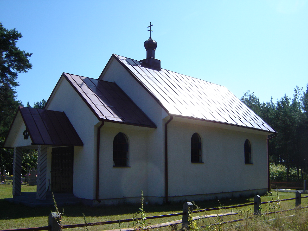 Cerkiew cmentarna w Jelonce.